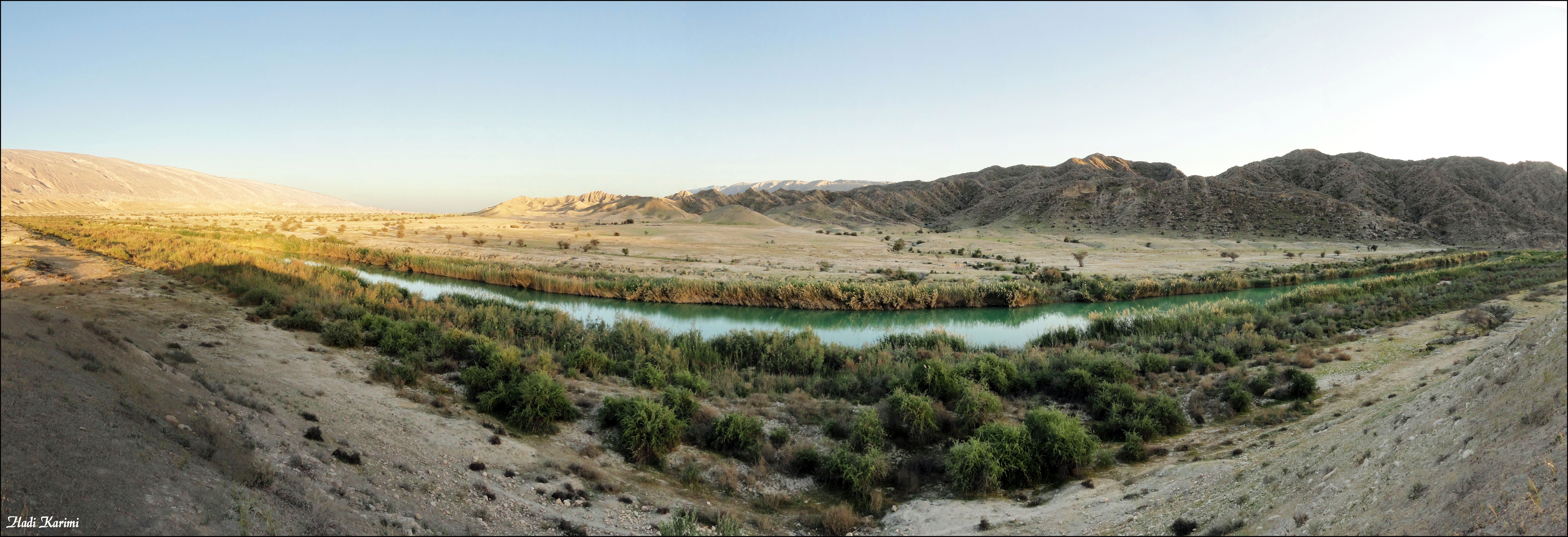 Alamarvdasht River, South of Fars Province, Iran